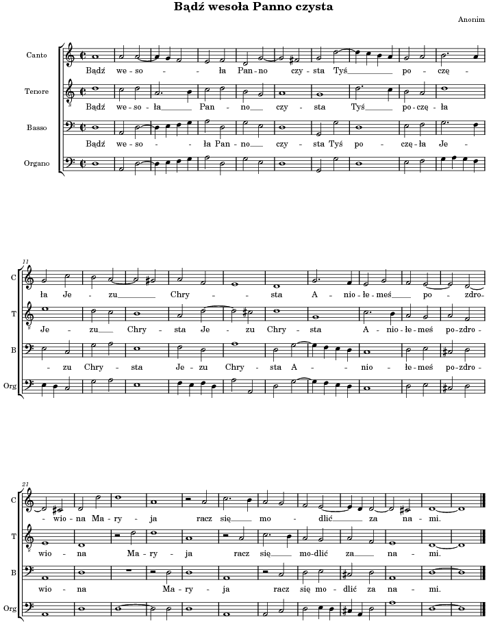 Transkrypcaj utworu z Kancjonału E, Staniątki.